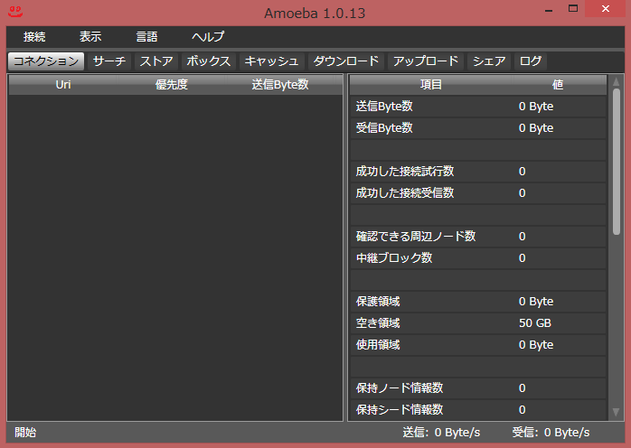 Amoeba1.0.13の動作画面